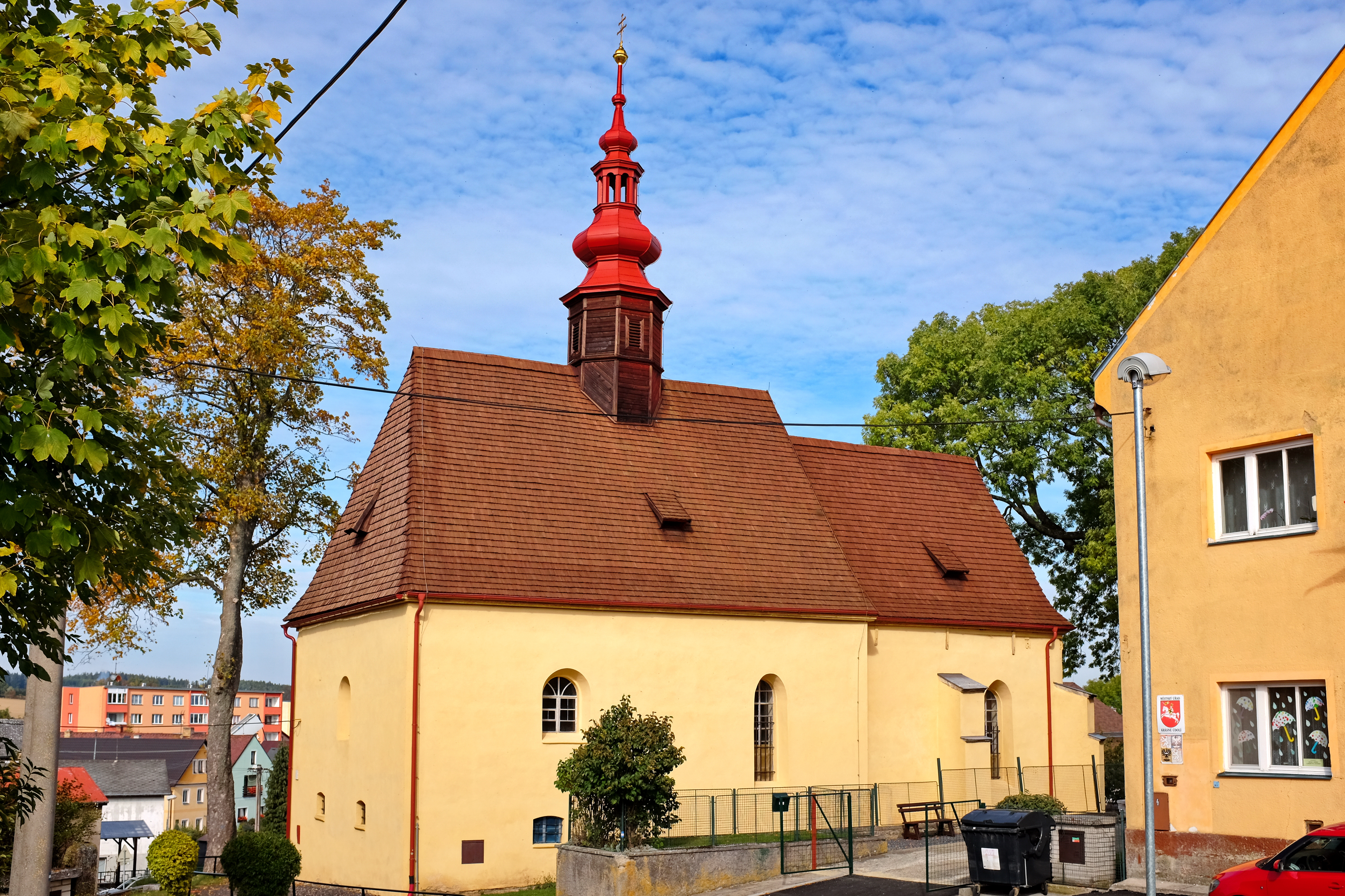 Kostel svatého Vavřince, jihozápadně od náměstí, st. 33, Krásné Údolí.